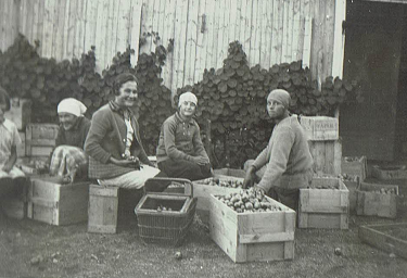 Omenasatoa